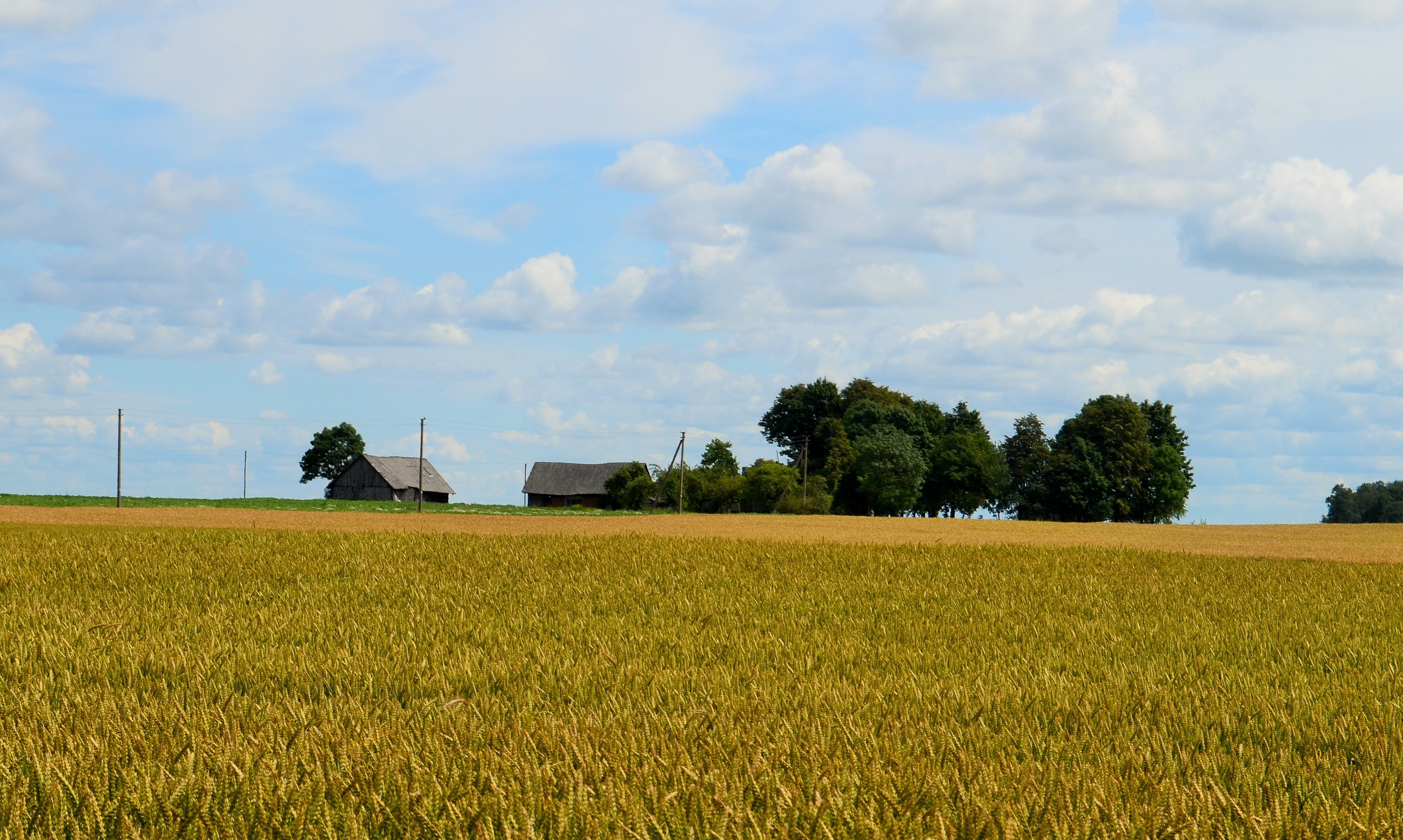 Puodžiai, Kėdainių raj.